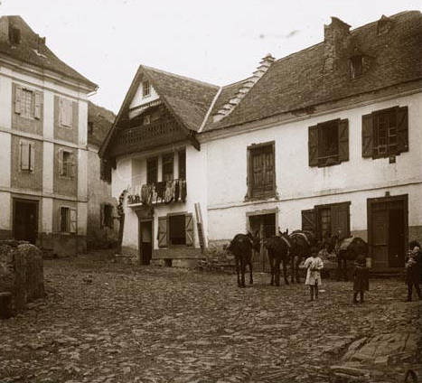 Infants i cavalls a la plaça d'Es Bòrdes. Santiago Perdigó i Díaz Caneja (1916-08)